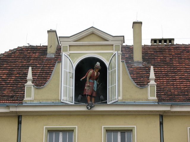 Pan Twardowski wychyla się z okna kamienicy Stary Rynek 15 w Bydgoszczy